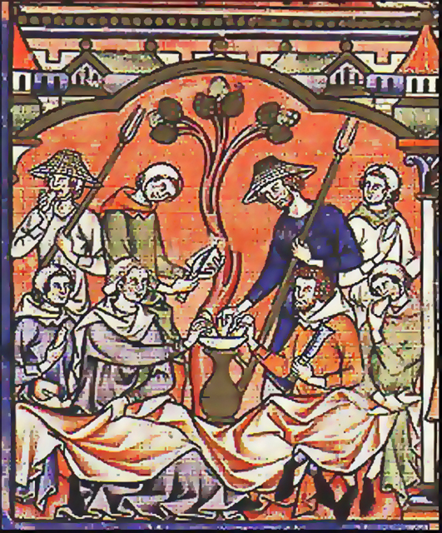 Pain trempé dans du vin au Moyen Age